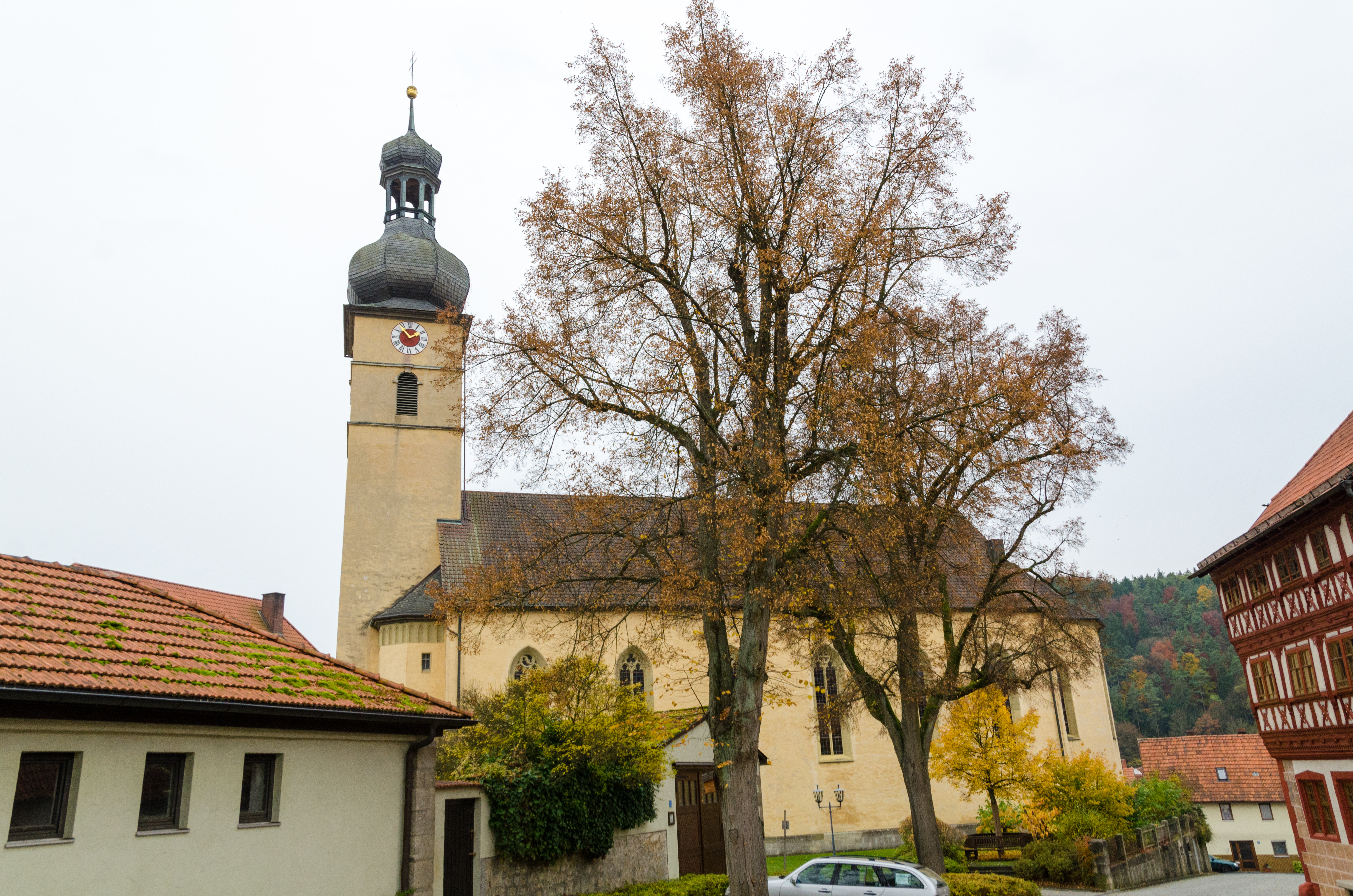 Stockheim, Am Tanzberg, Katholische Pfarrkirche St. Vitus